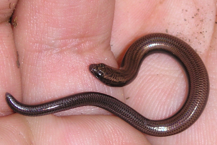 Scelotes mossambicus